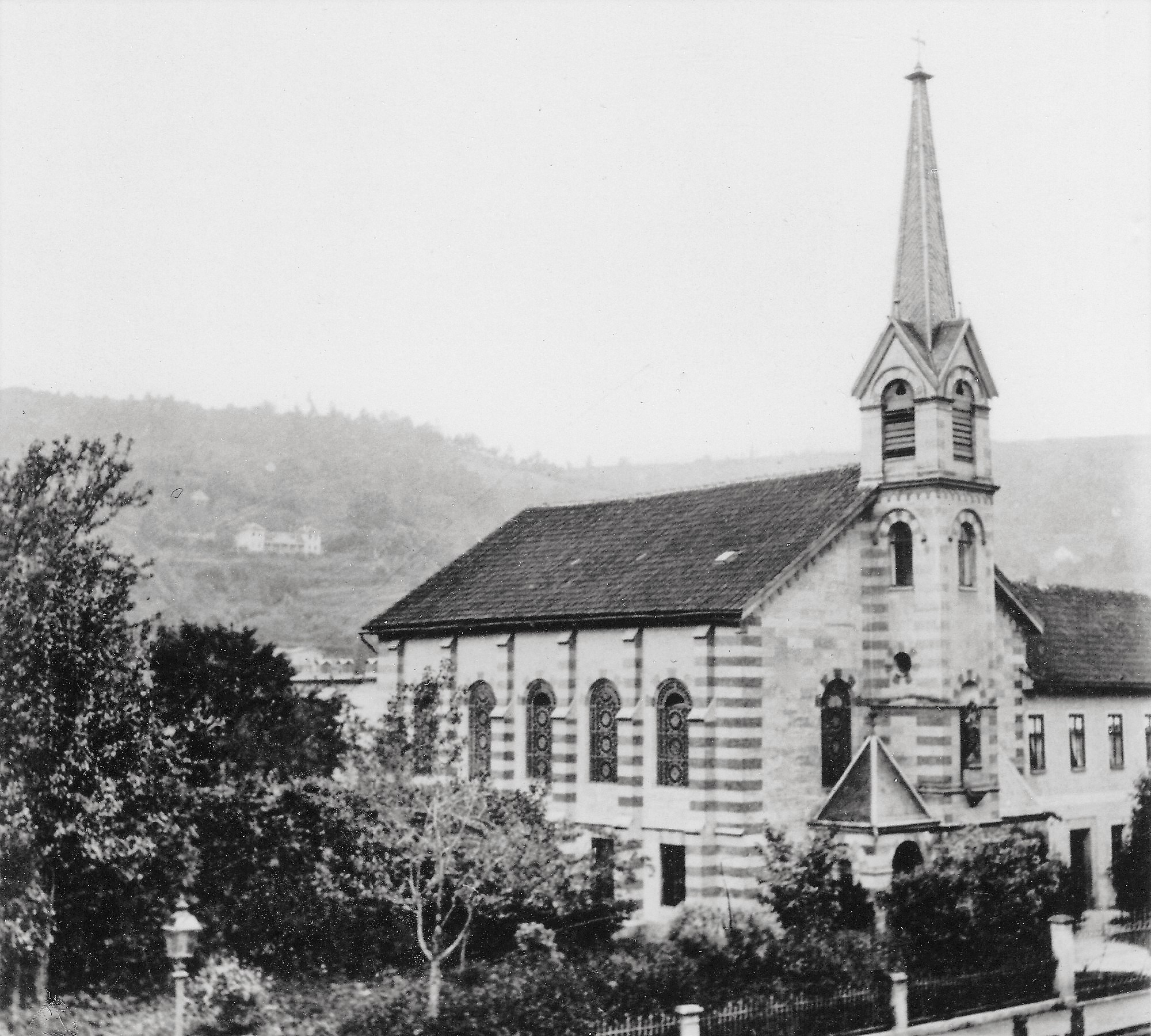 Katholische Kirche „Unbefleckte Empfängnis Mariens“ in Meiningen, erbaut 1881, abgerissen 1967.